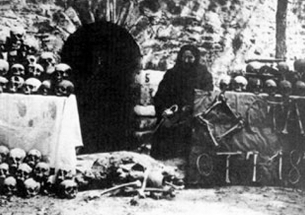 Batak massacre Massaker von Batak Bulgarien 1876